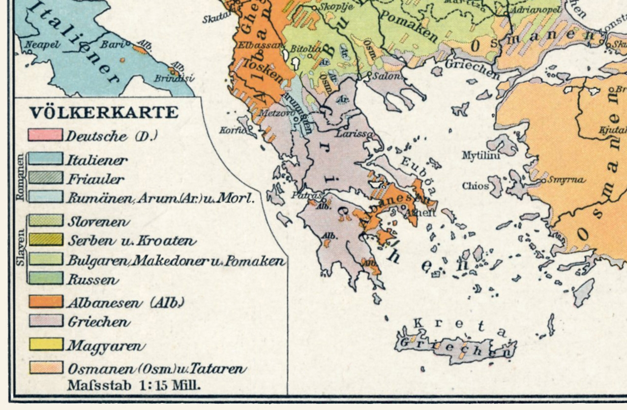 Karte der Bevölkerung des Balkans